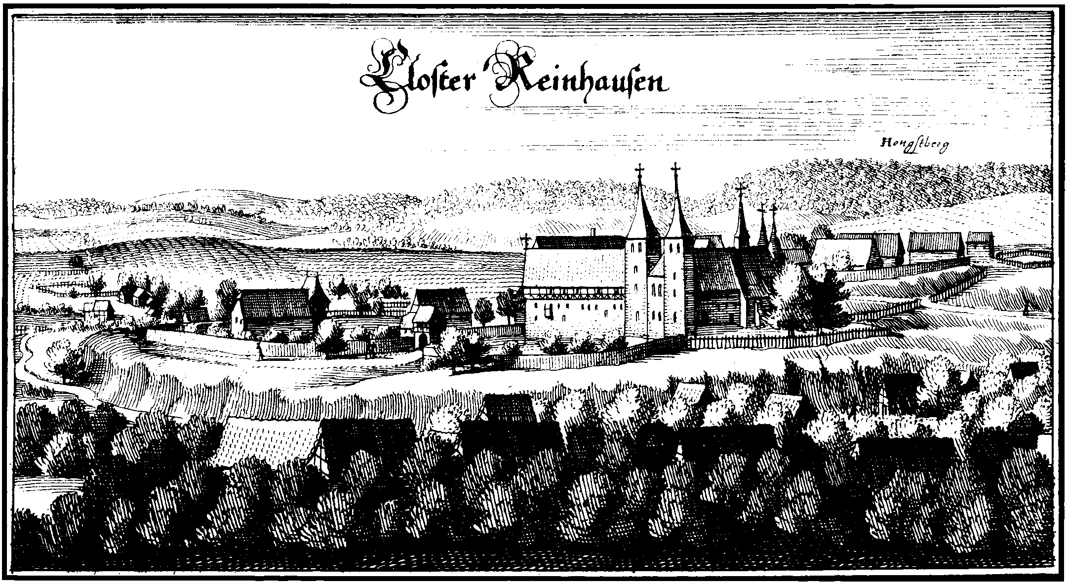 Ansicht der Klosteranlage in Reinhausen von Südwesten, Merian-Stich um 1650